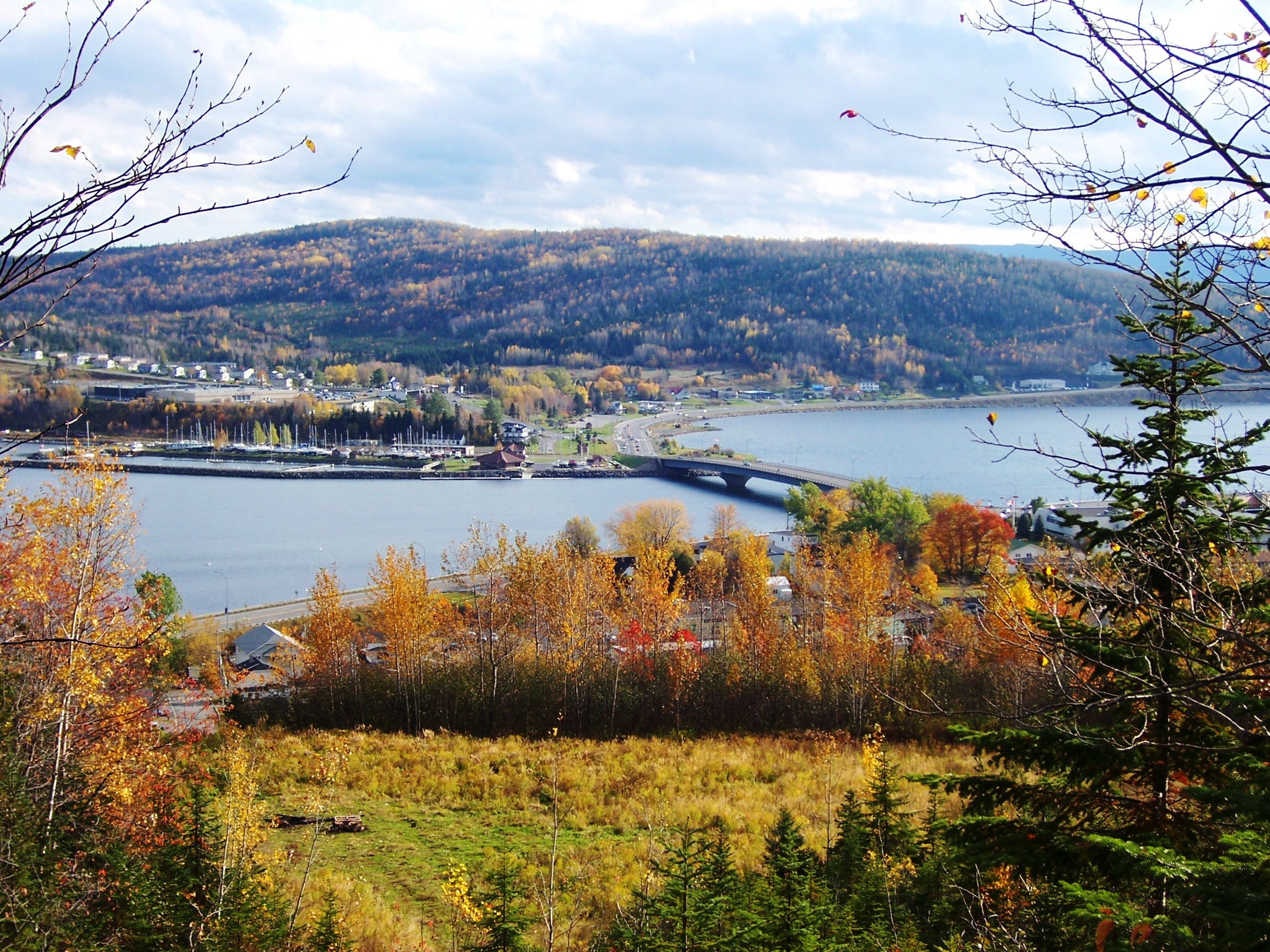 ville de gaspé vue de la montagne